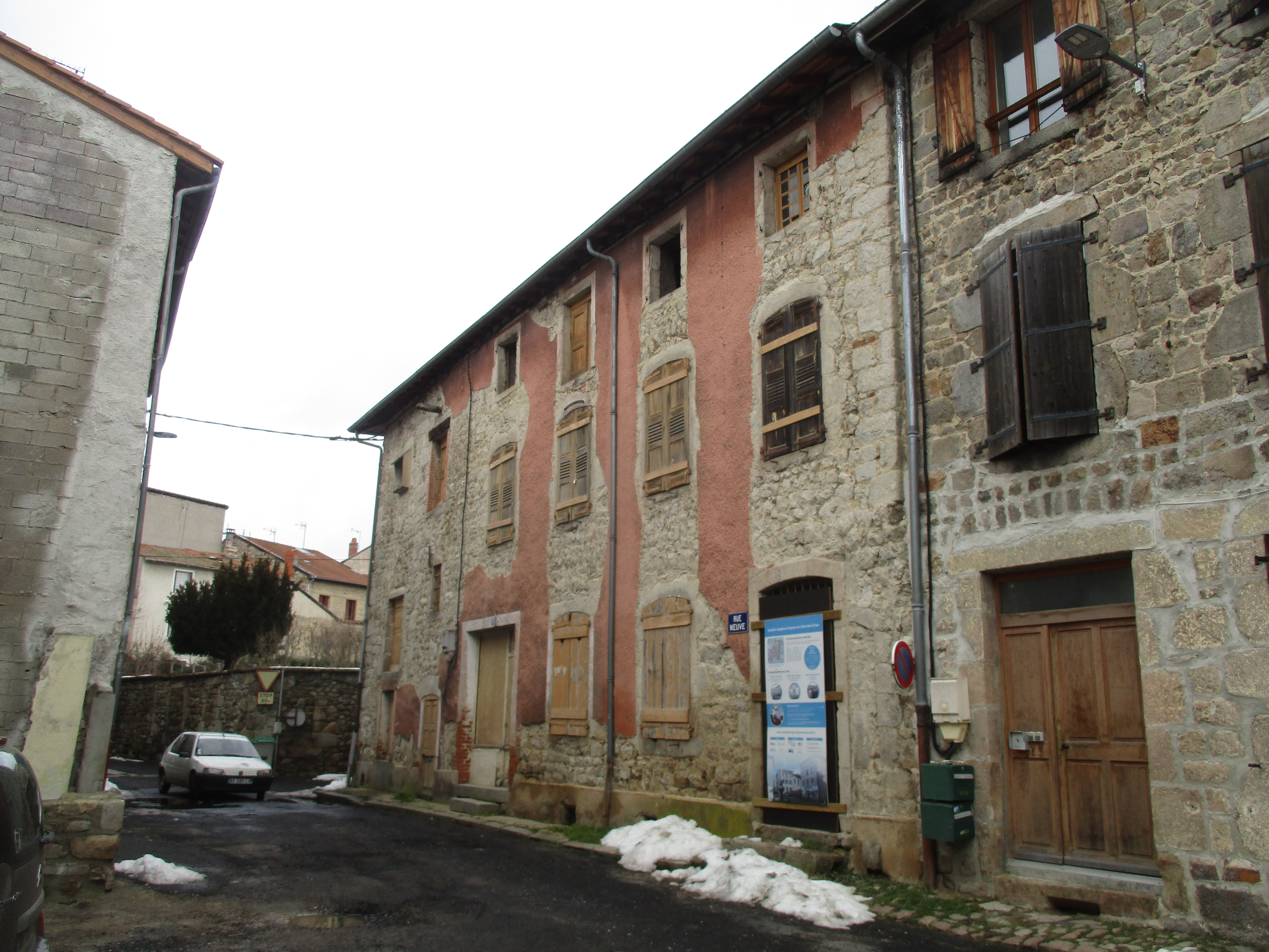 Grande bâtisse XVIIIe siècle à Craponne sur Arzon